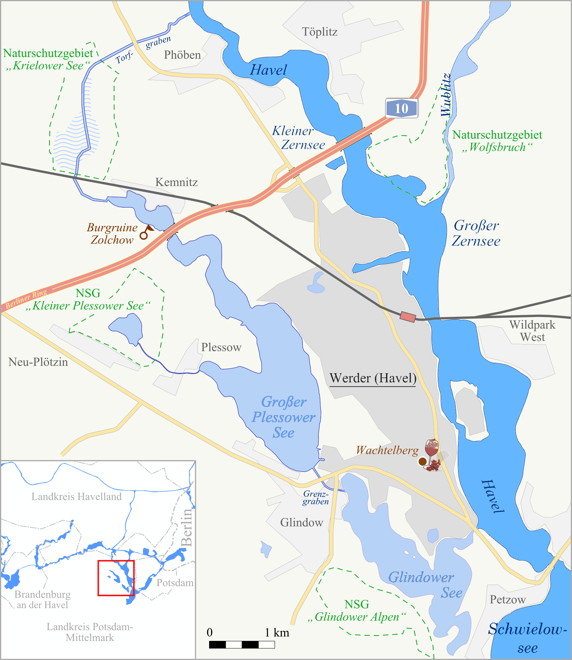 Abschnitt der GPotsdamer Havel bei Werder